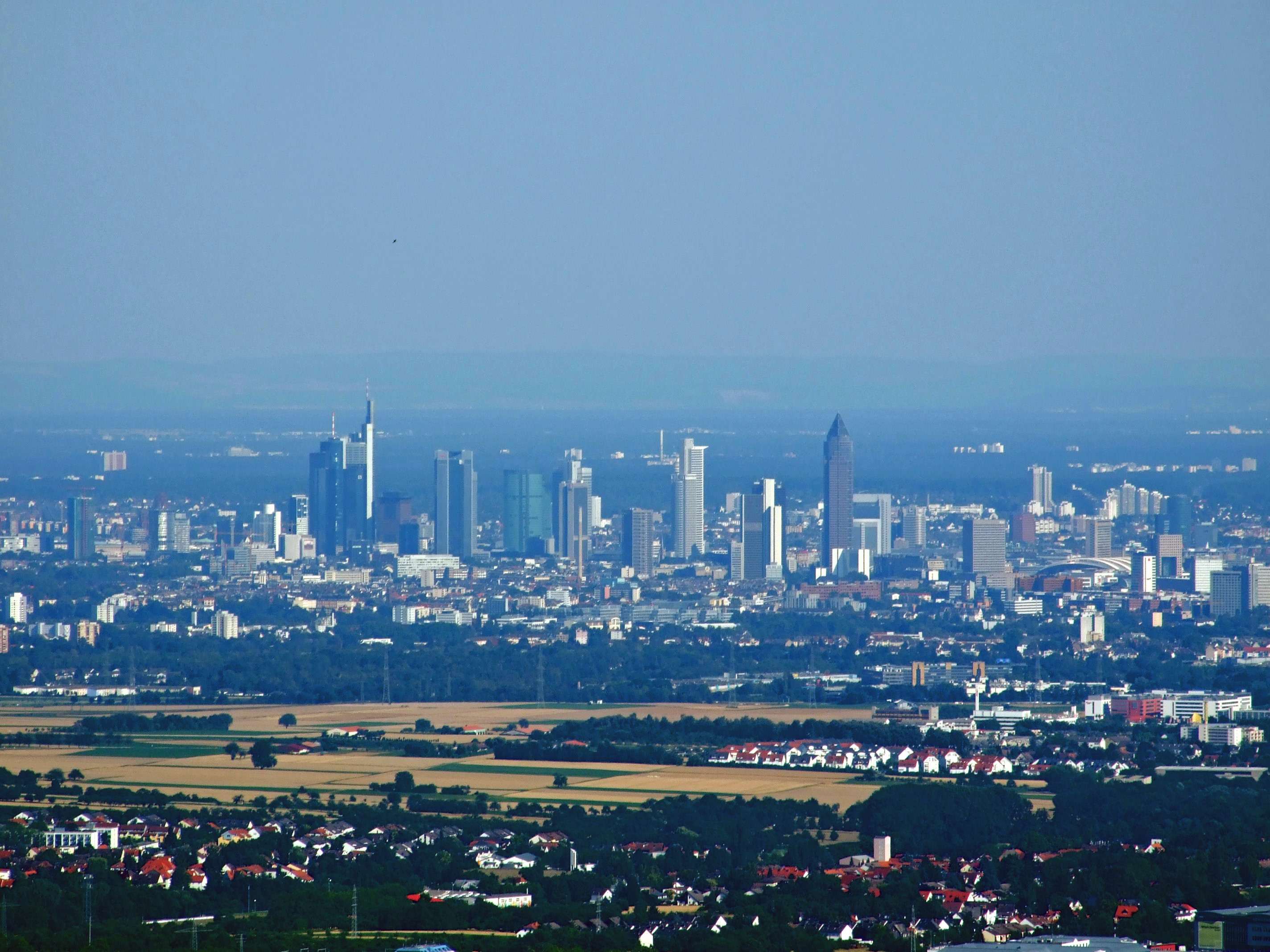 Blick von der Burgruine Falkensteinstein nach Frankfurt